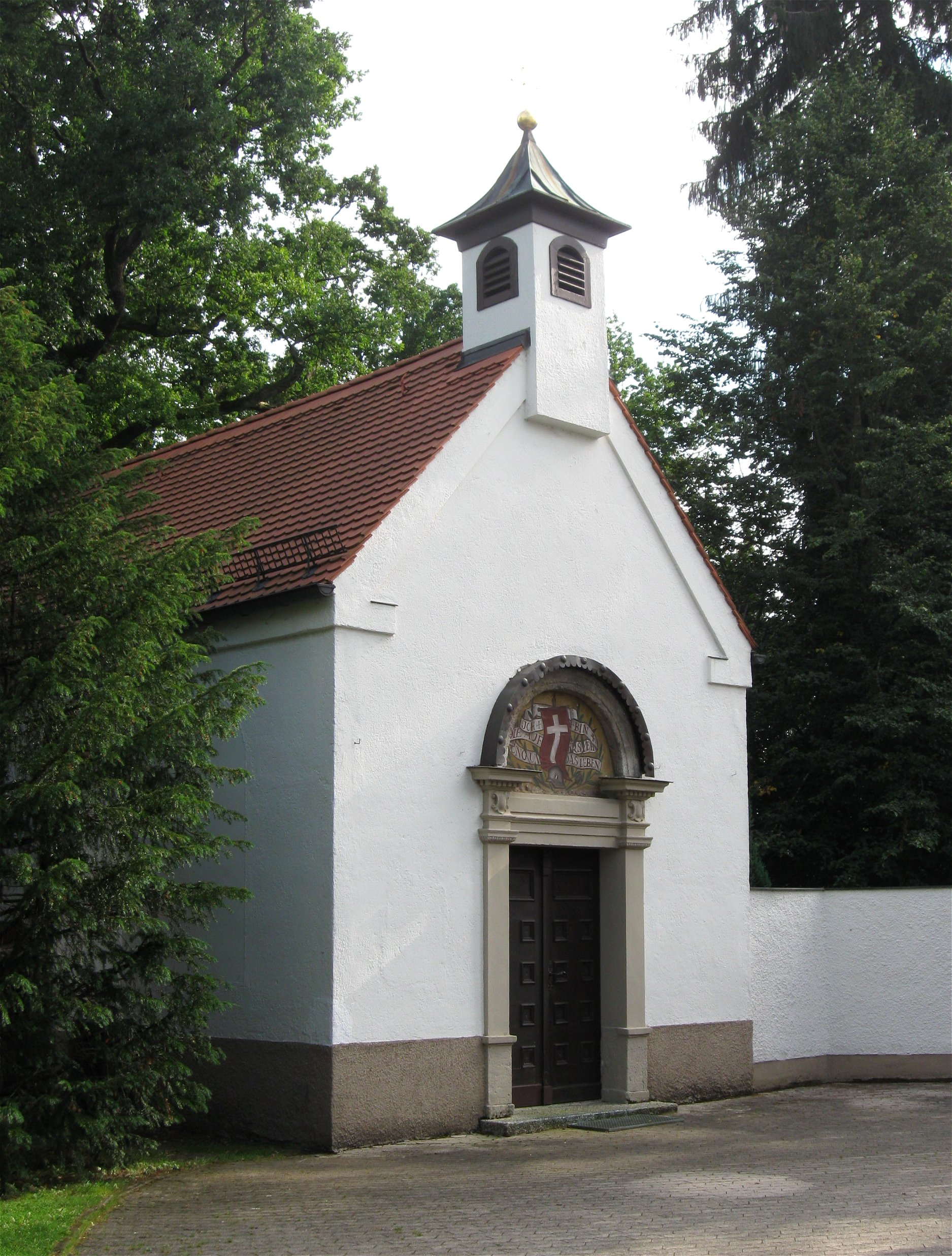 Hauptstraße 36; Ehem. Kath. Kapelle Maria im Walde, jetzt Kriegergedächtnisstätte, einschiffiger Putzbau mit geradem Chorschluss und Dachreiter, begonnen um 1914, vollendet nach Bauunterbrechung 1921. D-1-84-146-2